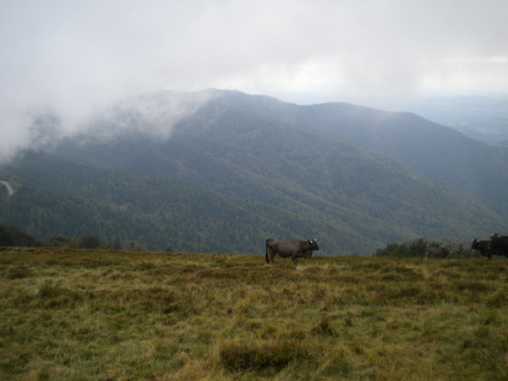 Vue des estives du col de Péguère (Ariège, France).